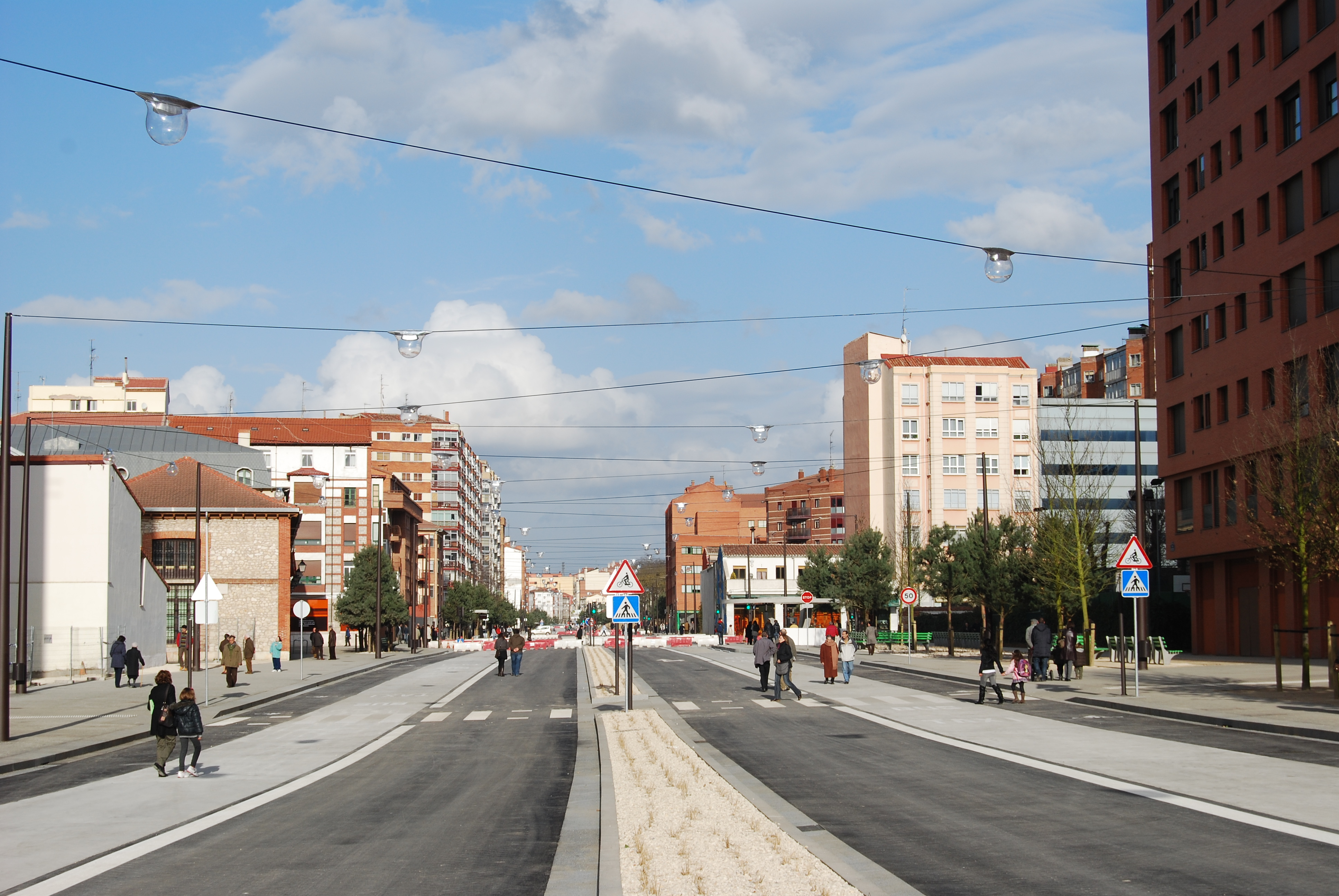 Bulevar del Ferrocarril de Burgos. Tramo entre El Carmen y la calle Madrid.